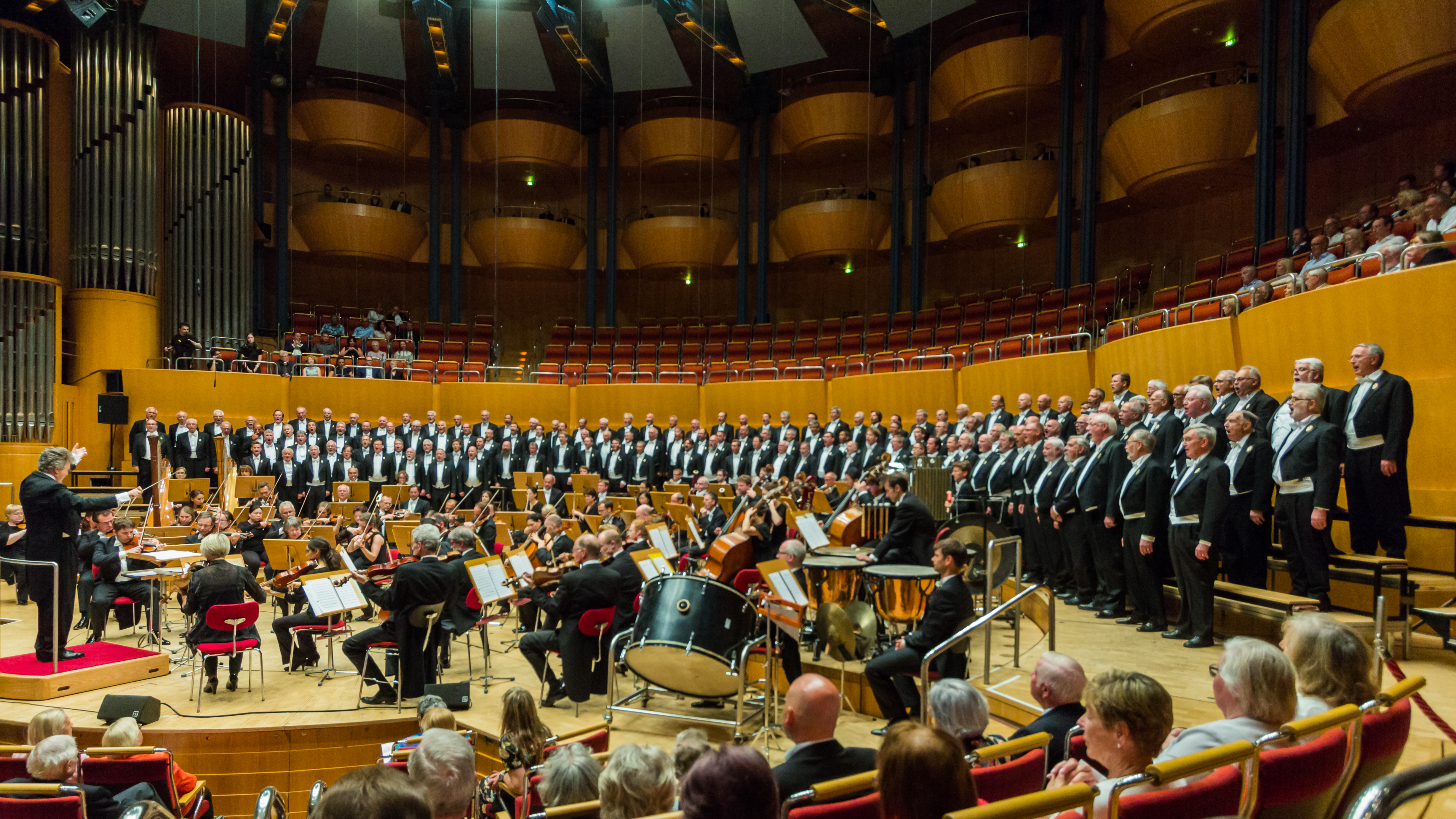 Festakt zum 175. Jubiläum des Zentral-Dombau-Vereins und des Kölner Männer-Gesang-Vereins Foto: Musiker der Neuen Philharmonie Westfalen, dahinter Sänger des Kölner Männer-Gesang-Vereins